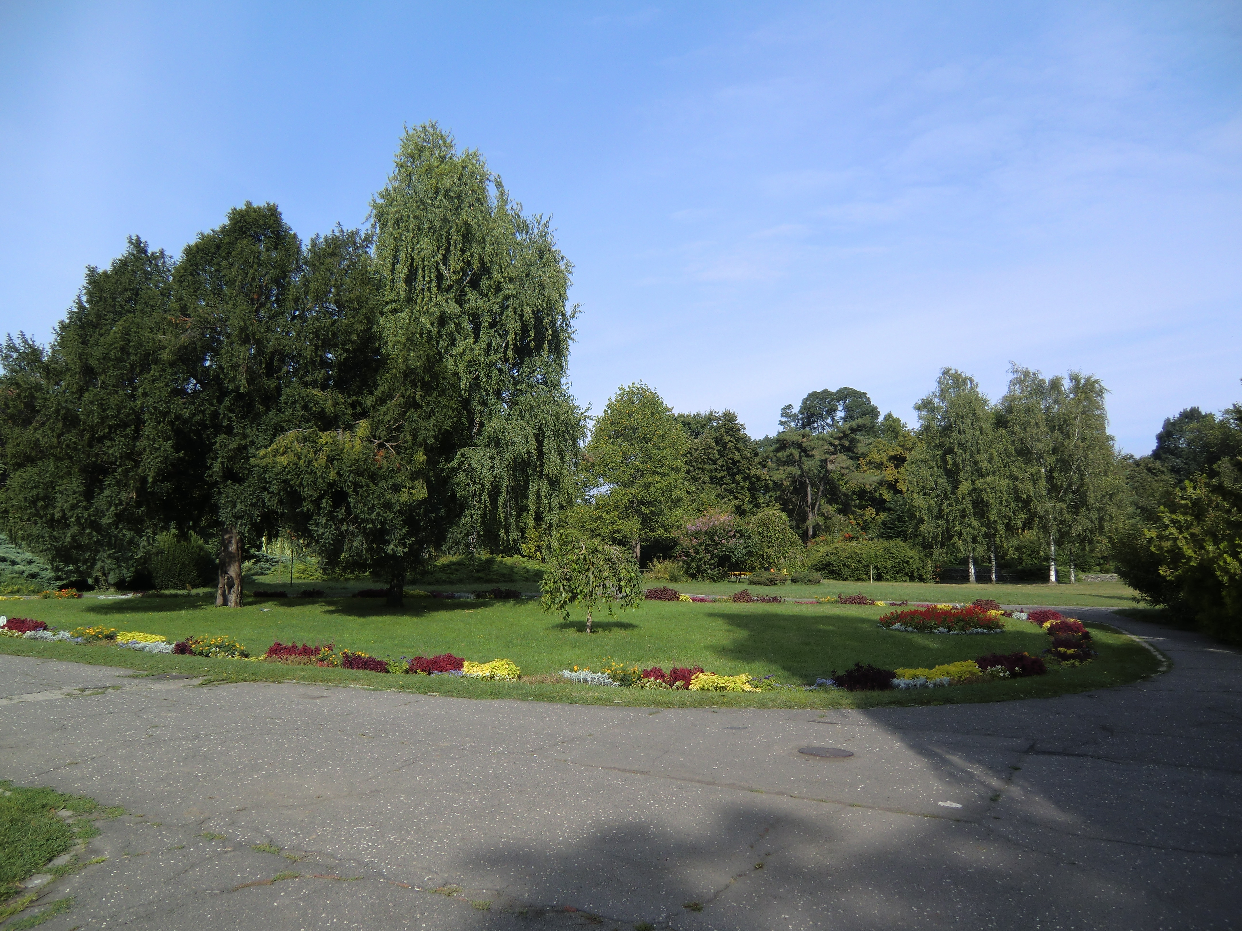 Botanischer Garten Temeswar